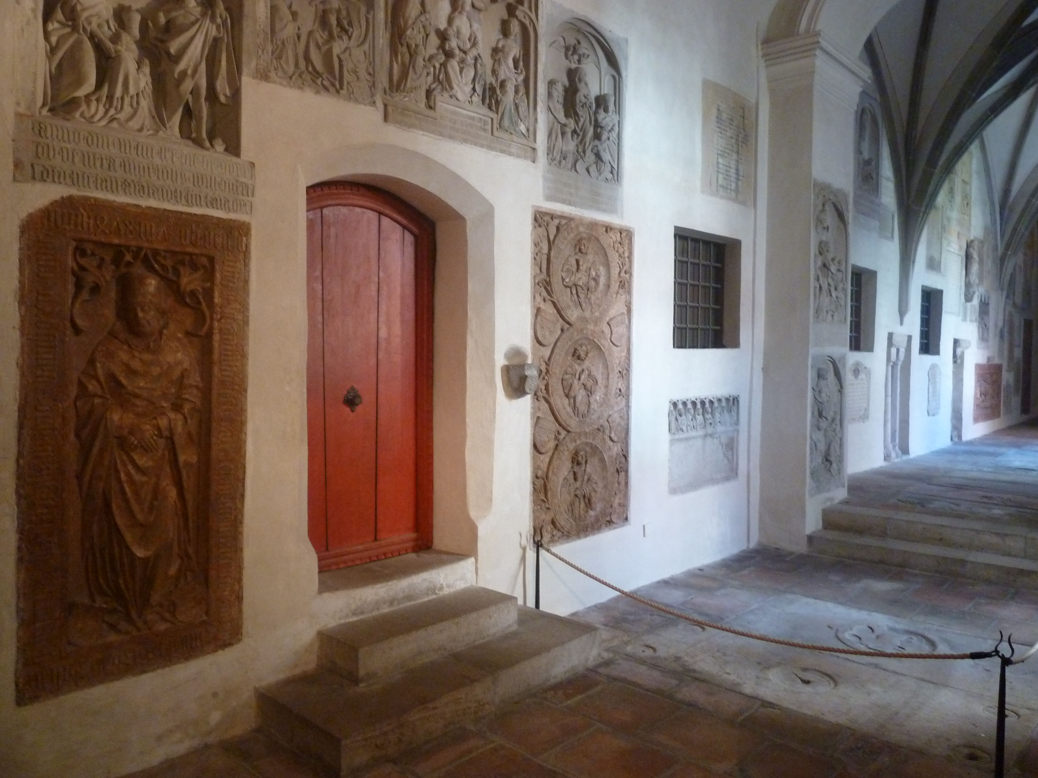 Heutiger Eingang in den Kapitelsaal vom östlichen Kreuzgang